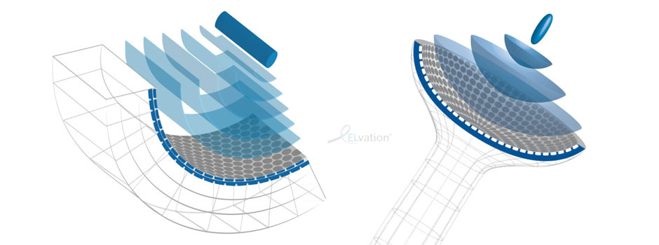 Stoßwellen Formation